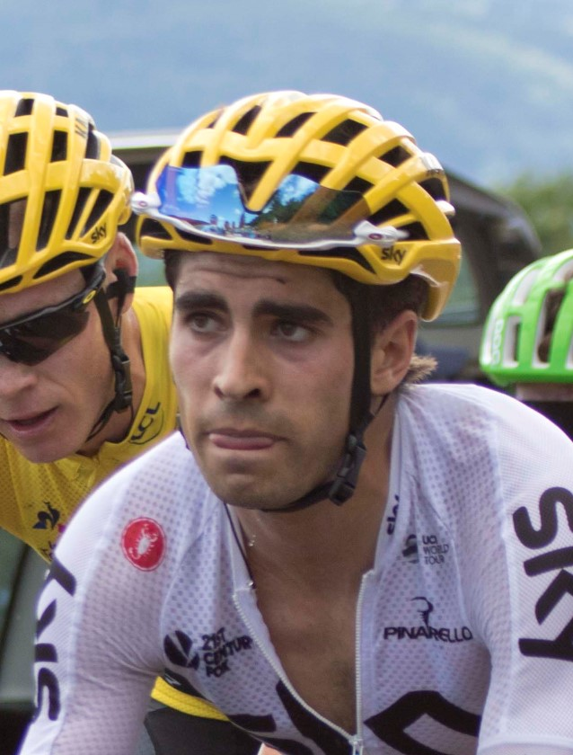 16-7_5 groep gele trui